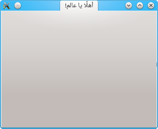 نافذة فارغة صُمِّمت بـ pyQt